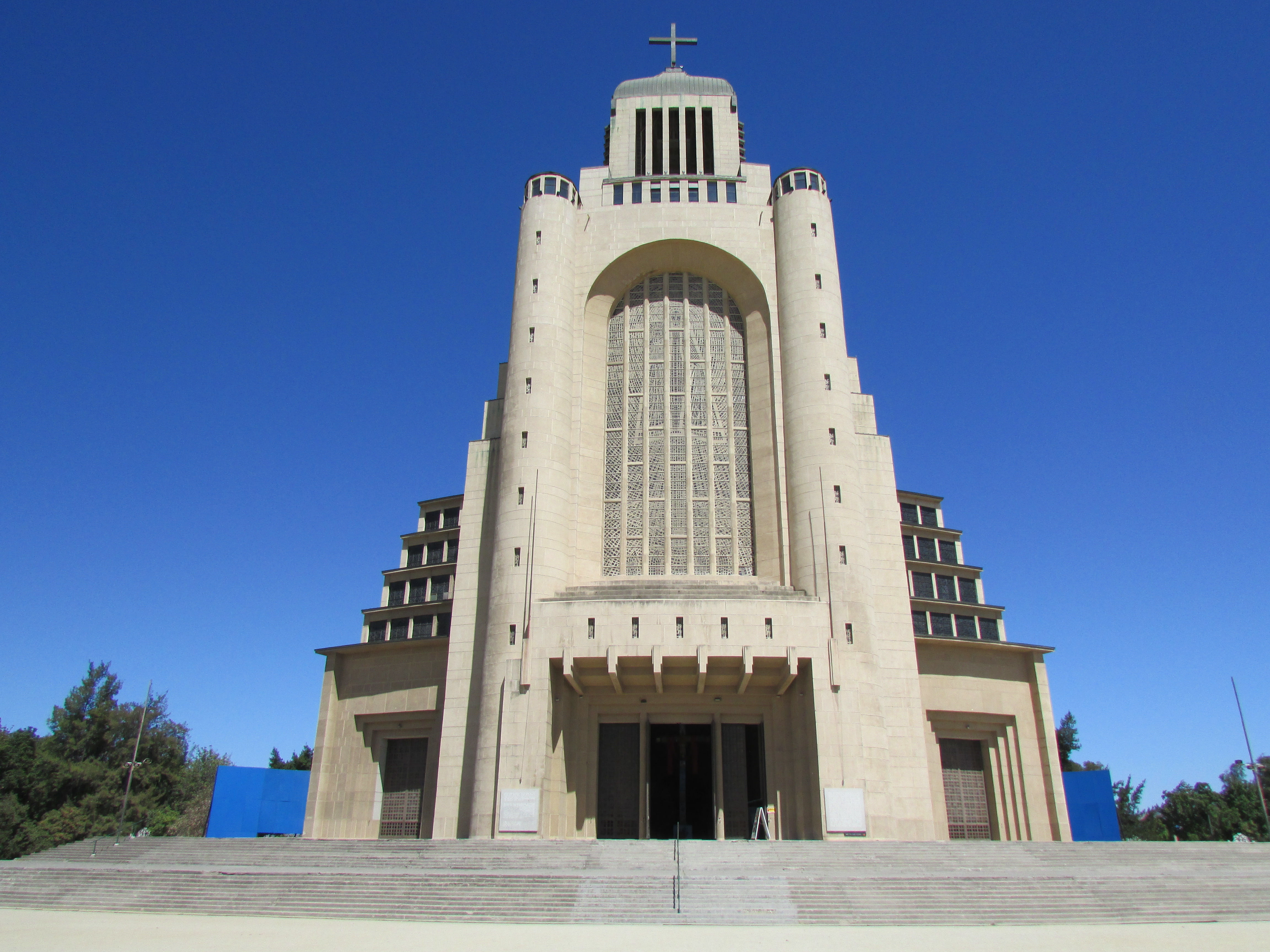 Templo Votivo de Maipú, vista exterior